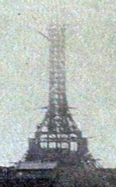 Detaliu la Crucea Eroilor de pe Muntele Caraiman